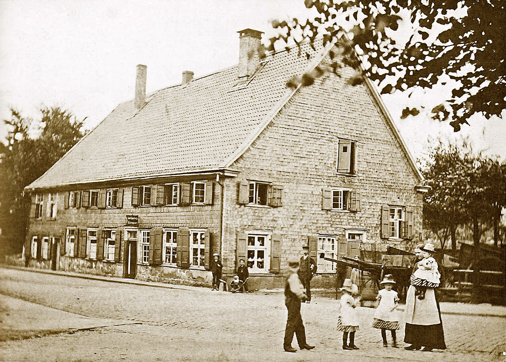 Der Schultenhof in Möllenkotten vor seinem Abbruch im Jahre 1890